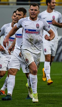 Заря - Герта 2:1